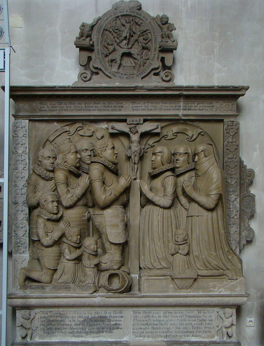 Historisches Grabmal (Johann Sigmund von Remchingen)in der Martinskirche in Kirchheim unter Teck